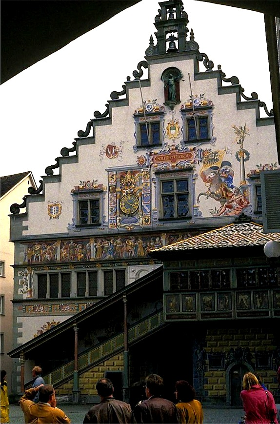 Altes Rathaus von Lindau am Bodensee